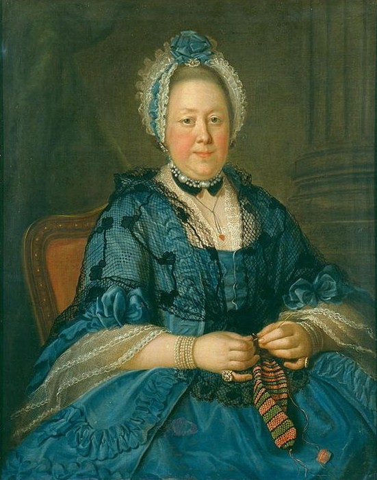 Учитывая год создания портрета, определение изображённой как графини Толстой (урождённой Лопухиной), утвердившееся в литературе, начиная с каталога выставки «Старые годы» (1908), вызывает сомнение. Возможно, на портрете изображена Вера Борисовна Лопухина (1716—1789), мать графини Толстой и сестра графа П.Б. Шереметева, которому принадлежал крепостной художник И. Аргунов.